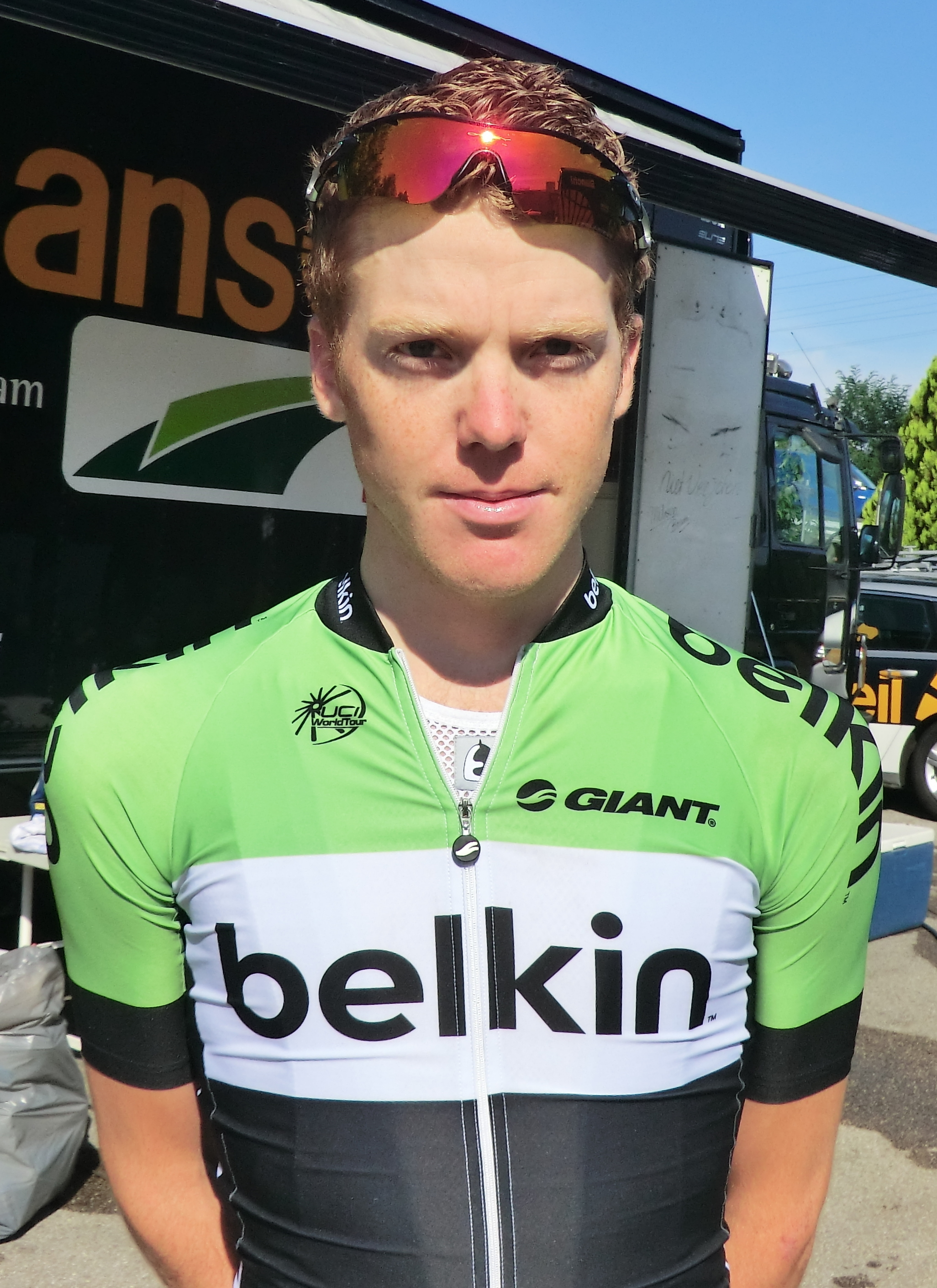 Coureurs à l'échauffement au matin du prologue du tour de l'Ain 2013, à l'hôtel Lyon-Est à Saint-Maurice-de-Beynost.